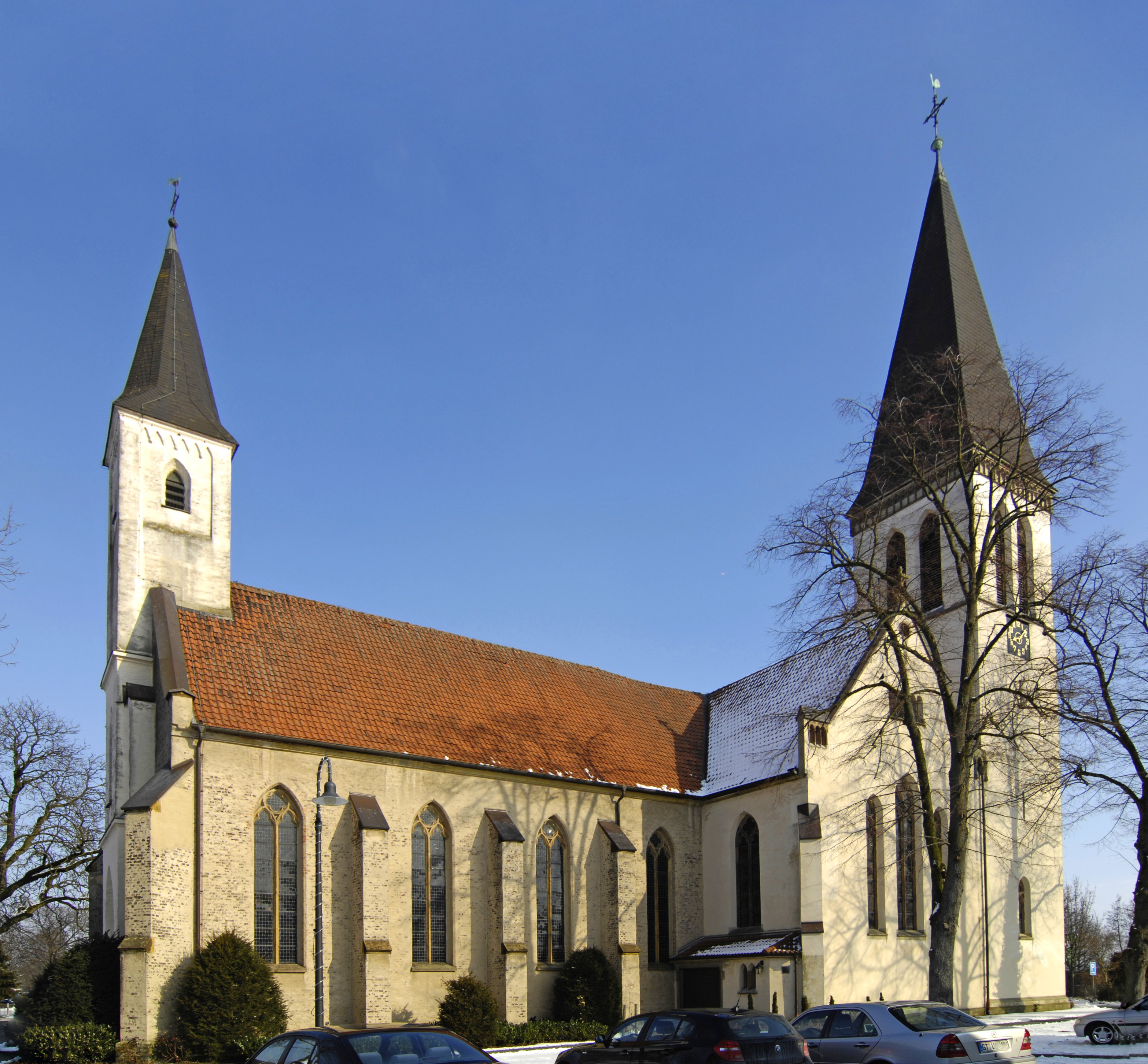 Benteler, St. Antonius, kath. Kirche